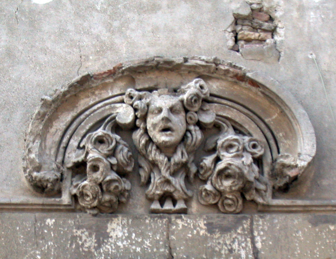 Italia, Regione Lazio, Provincia di Roma, Sacrofano, palazzo Placidi-Serraggi, decorazione di finestra.